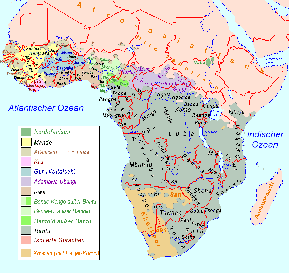 Map of the Niger-Congo-languages und Khoi-San-languages in Afrika / Karte der Niger-Kongo-Sprachen und Khoisan-Sprachen in Afrika